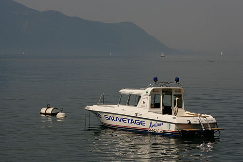 Sauvetage